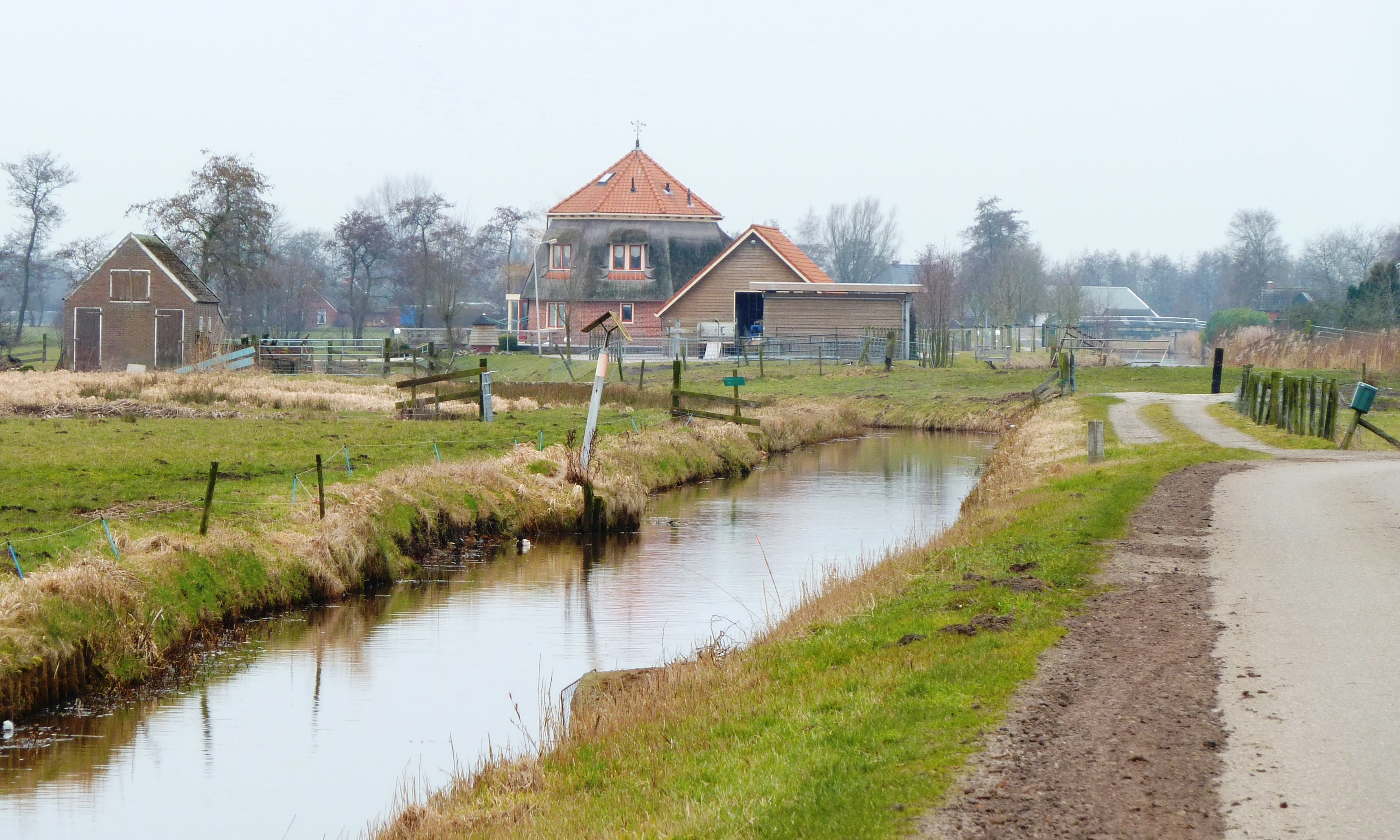 Molen Bombay in de polder Bombay (gehucht De Bombay) aan de weg Bombaij in de gemeente Grootegast (Groningen, Nederland)